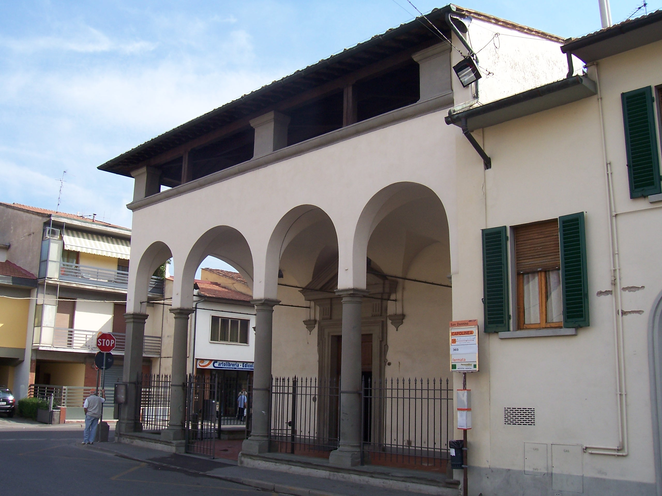 Francesco da Campi; foto propria; Chiesa S.Andrea